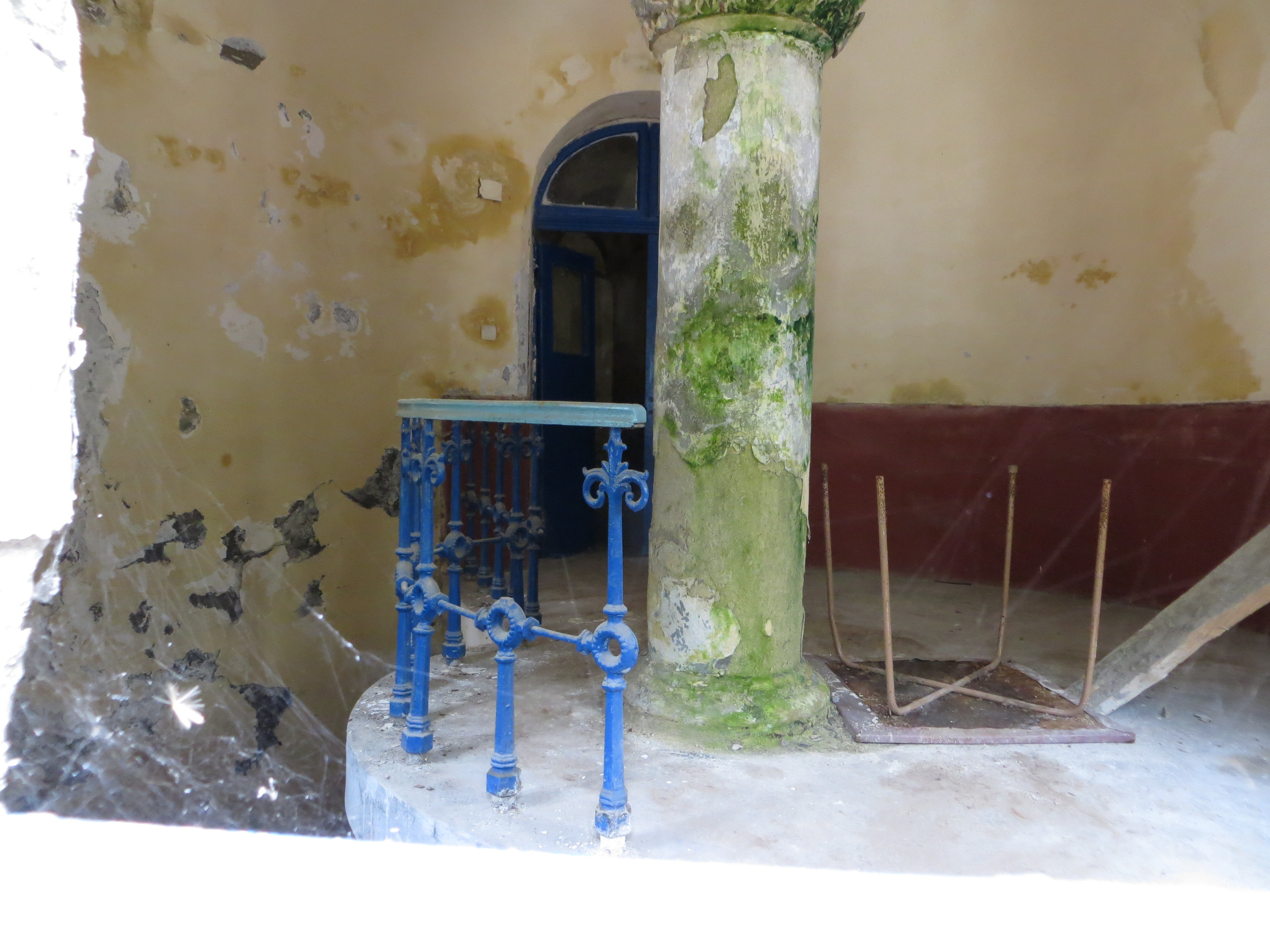 Baia "Hebe", azi parte a Hotelului "Apollo" 01